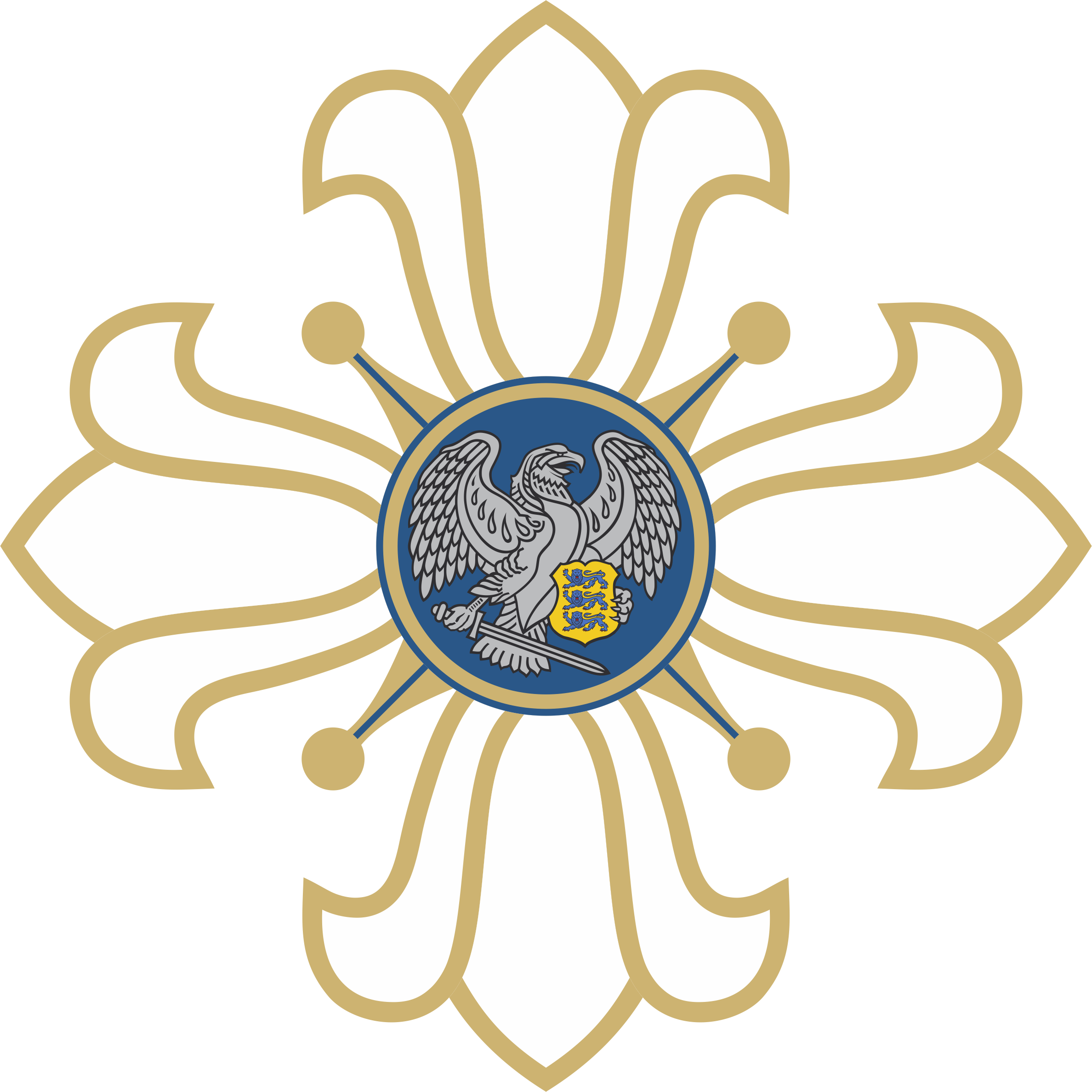 Naiskodukaitse keskseks sümboliks on liiliarist. See kaunistab Naiskodukaitse lippe, teenetemedaleid, rinna- ja kübaramärki, stiliseeritud kujul ka meie sõrmust. Samuti on liiliarist Naiskodukaitse ametlikuks logoks dokumentatsioonis, trükistel, esitlustel, plakatitel ja muudes meid tutvustavates materjalides. Liiliaristi kavandi töötas 2001. aastal välja Eesti üks tunnustatumaid heraldikuid Priit Herodes ning see sümboliseerib puhtust, vaimsust ja väärikust.